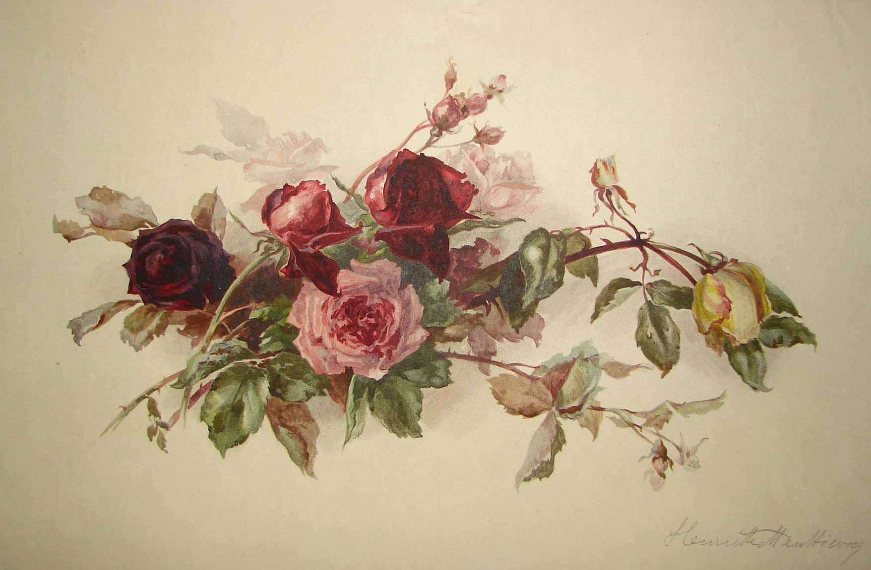 Henriette Mankiewicz - Rosenzweige, 20 x 34,5 cm, Lichtdruck nach einem Aquarell, aus der Jahresmappe der Gesellschaft für vervielfältigende Kunst